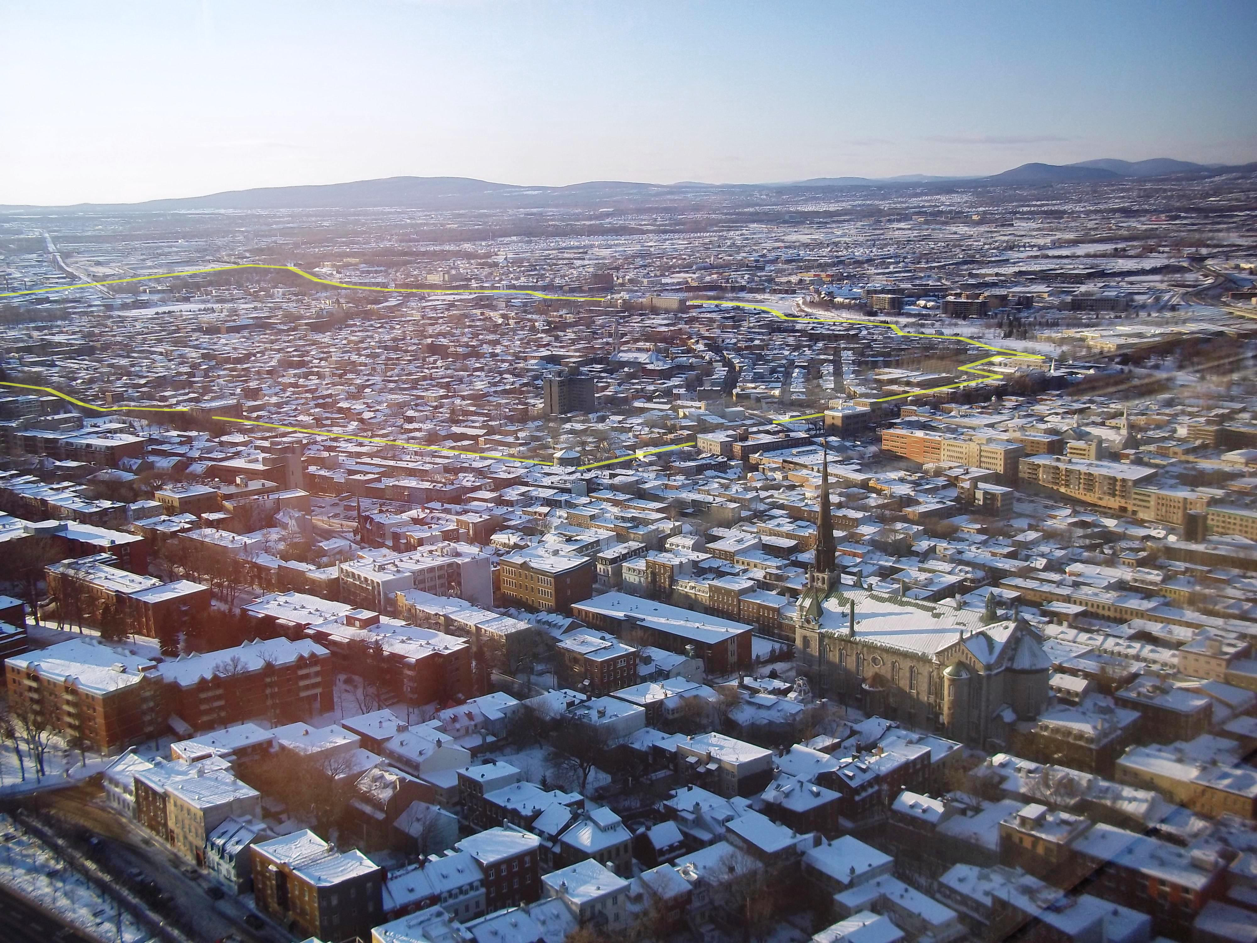 Limites géographiques du quartier Saint-Sauveur, tel que vu de l'Édifice Marie-Guyart.